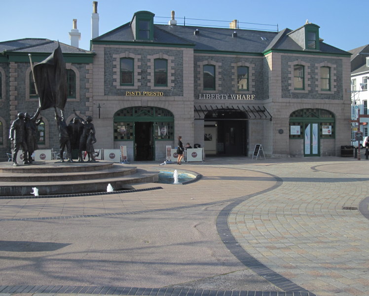 Nrf: Saint Hélyi, Jèrri, Mar 2010